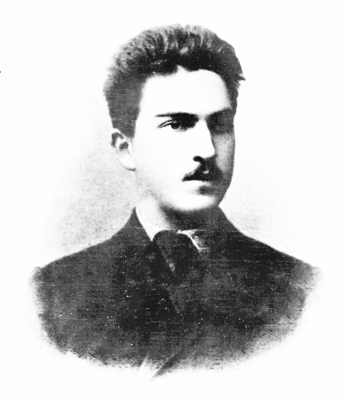 Maksimilian Il'ič Švejcer (1881-1905)